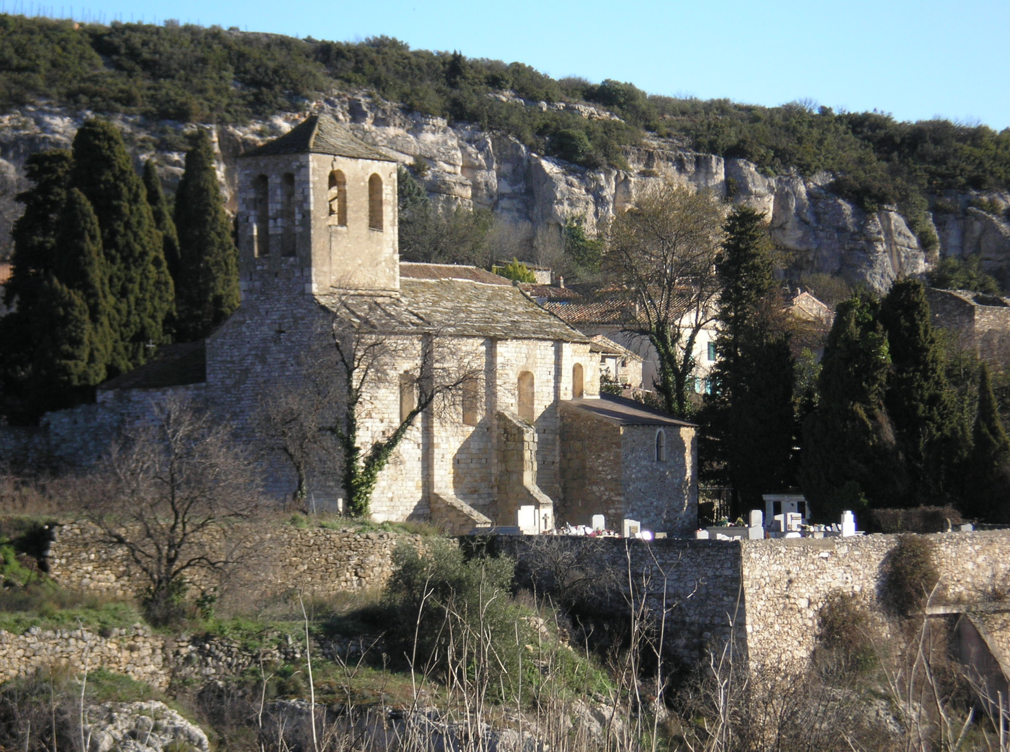 La Caunette (Hérault) - église romane de Notre-Dame de l'Assomption.